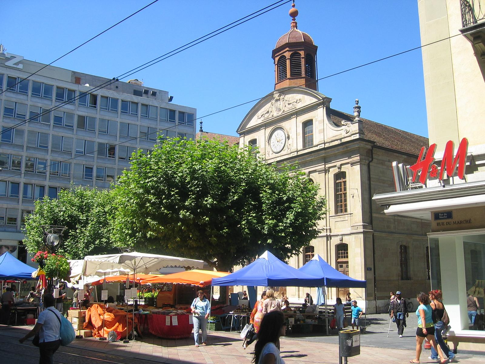 La place de la Fusterie à Genève